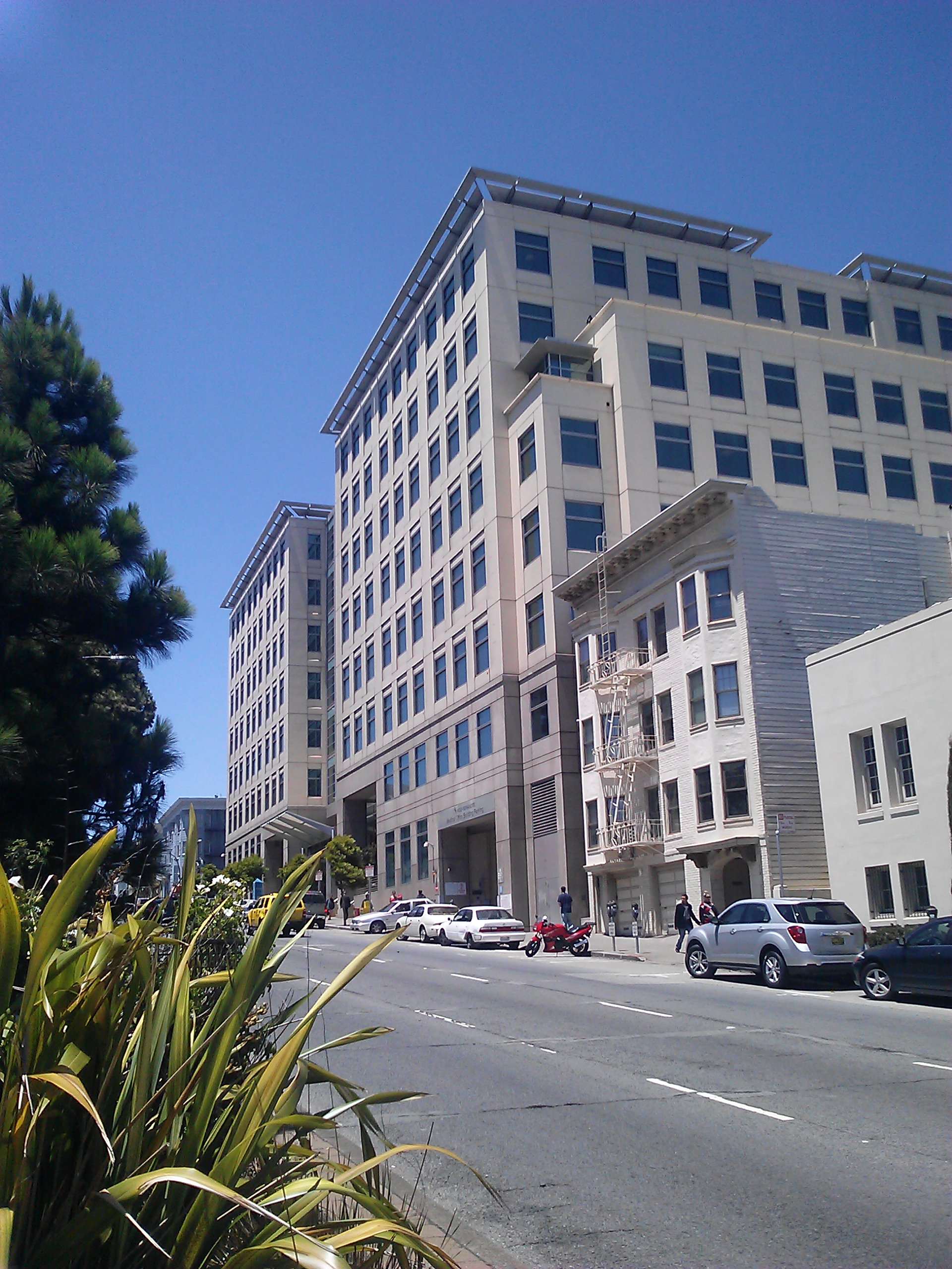 Kaiser permanente hospital as seen from divisadero & geary